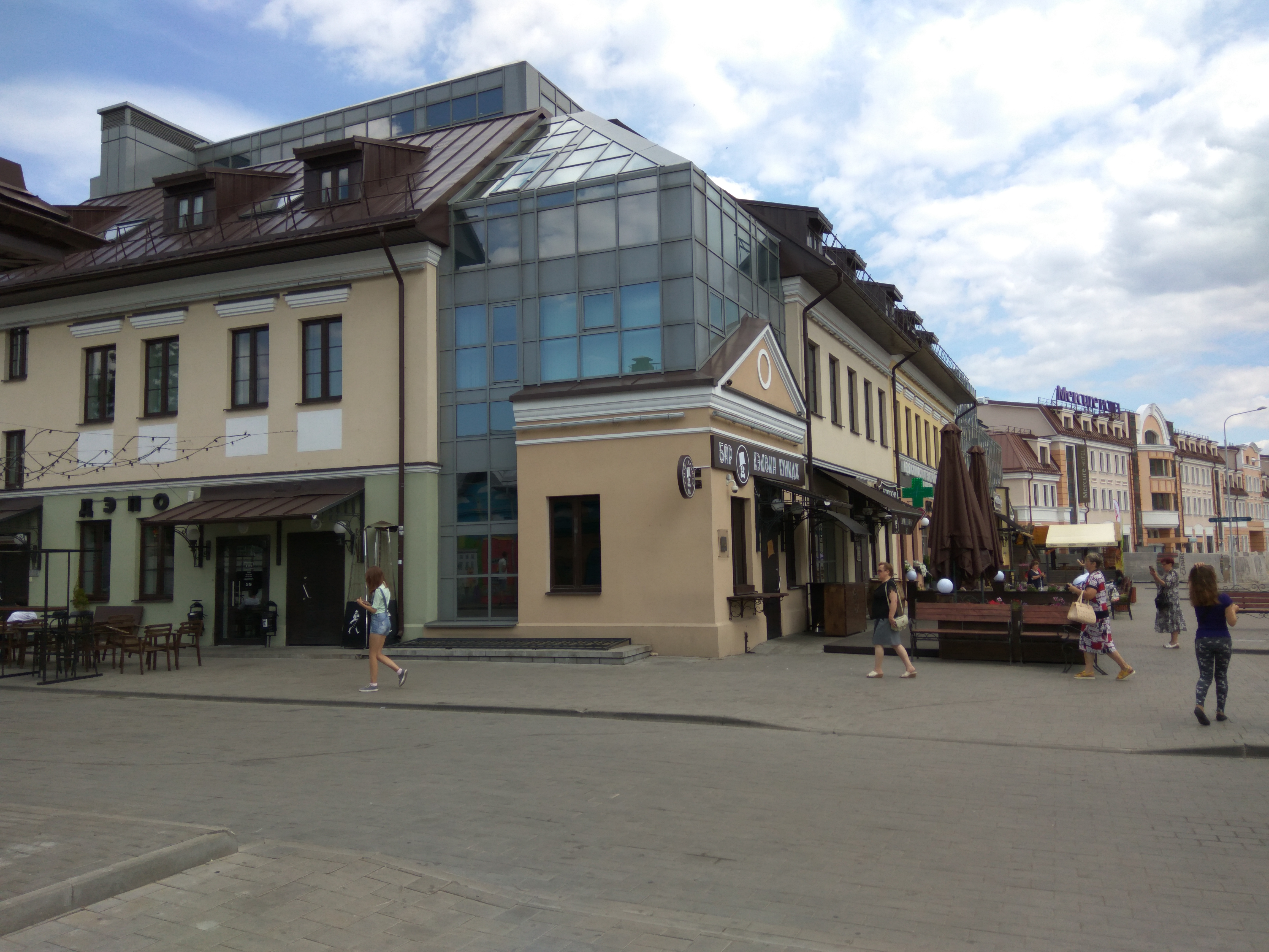 Мінск. Зыбіцкая вуліца